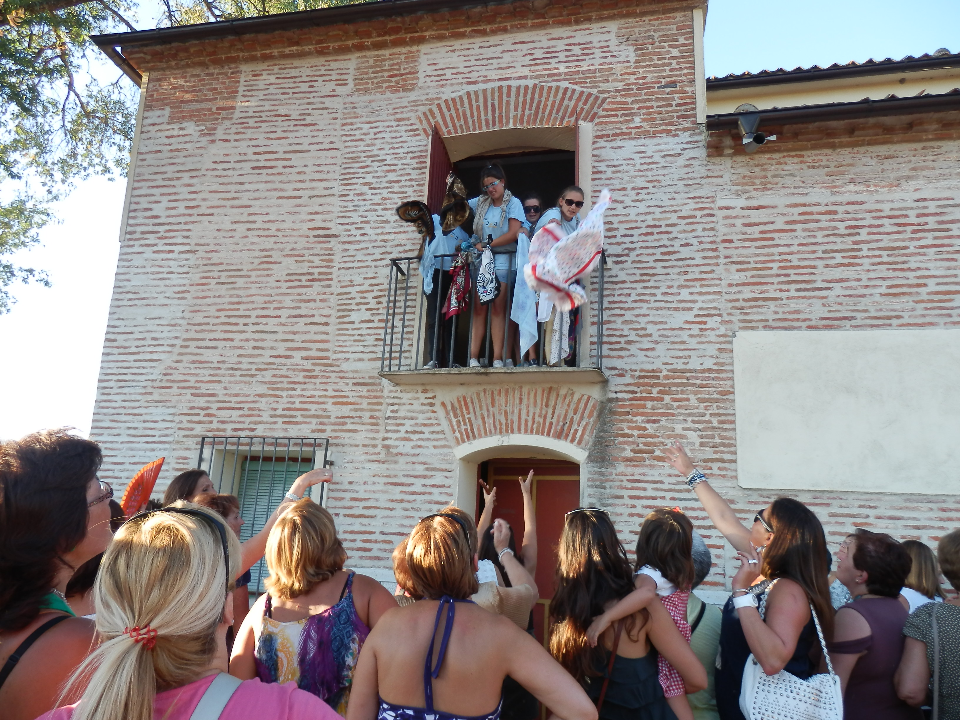 Los quintos lanzan los pañuelos desde un balcón a sus correspondientes dueños